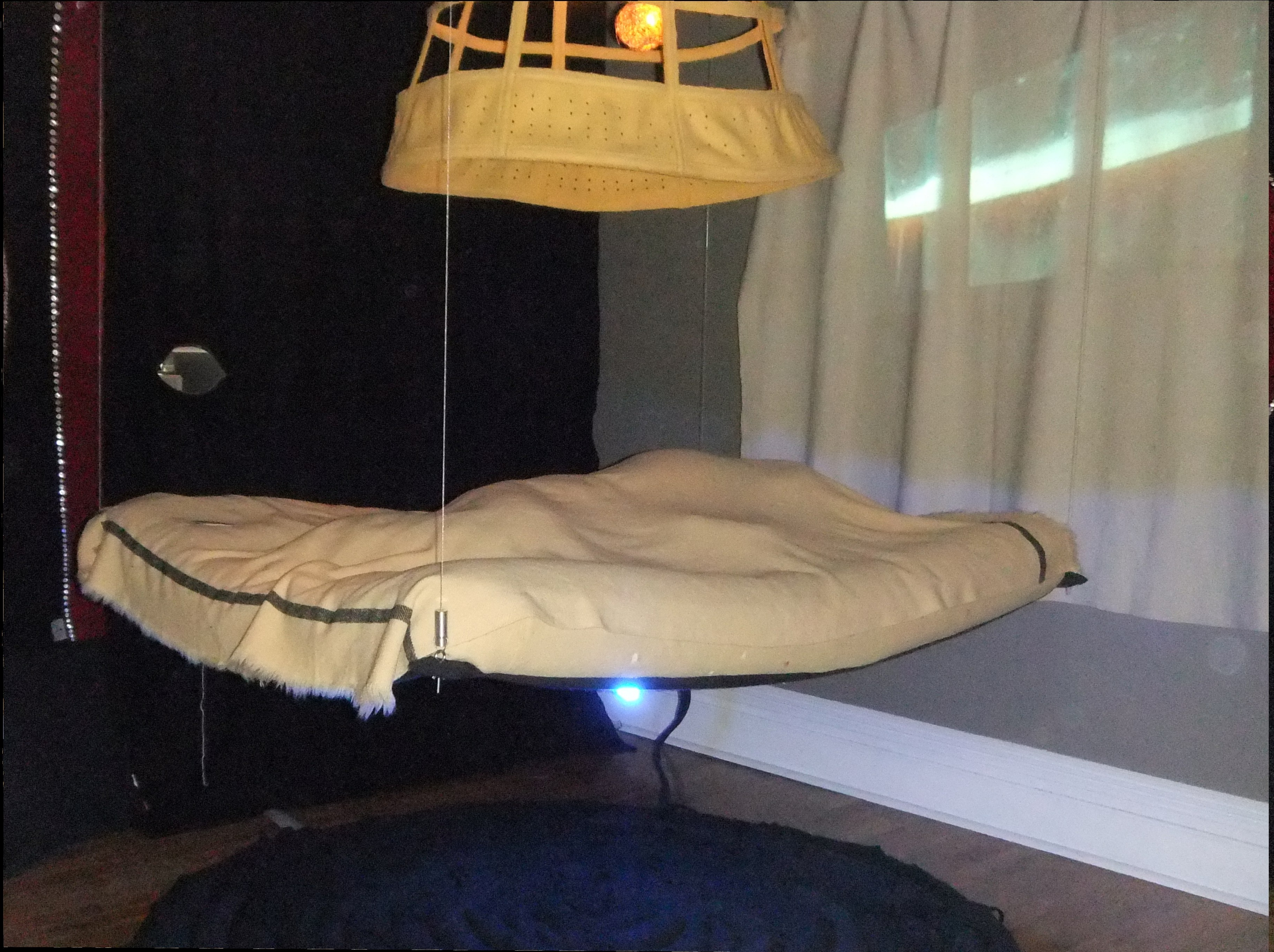 The Toronto Design Festival and the Come Up To My Room event at the Gladstone Hotel. 2D cropped version of file:Gladstone Hotel - Come up to my room - floating bed